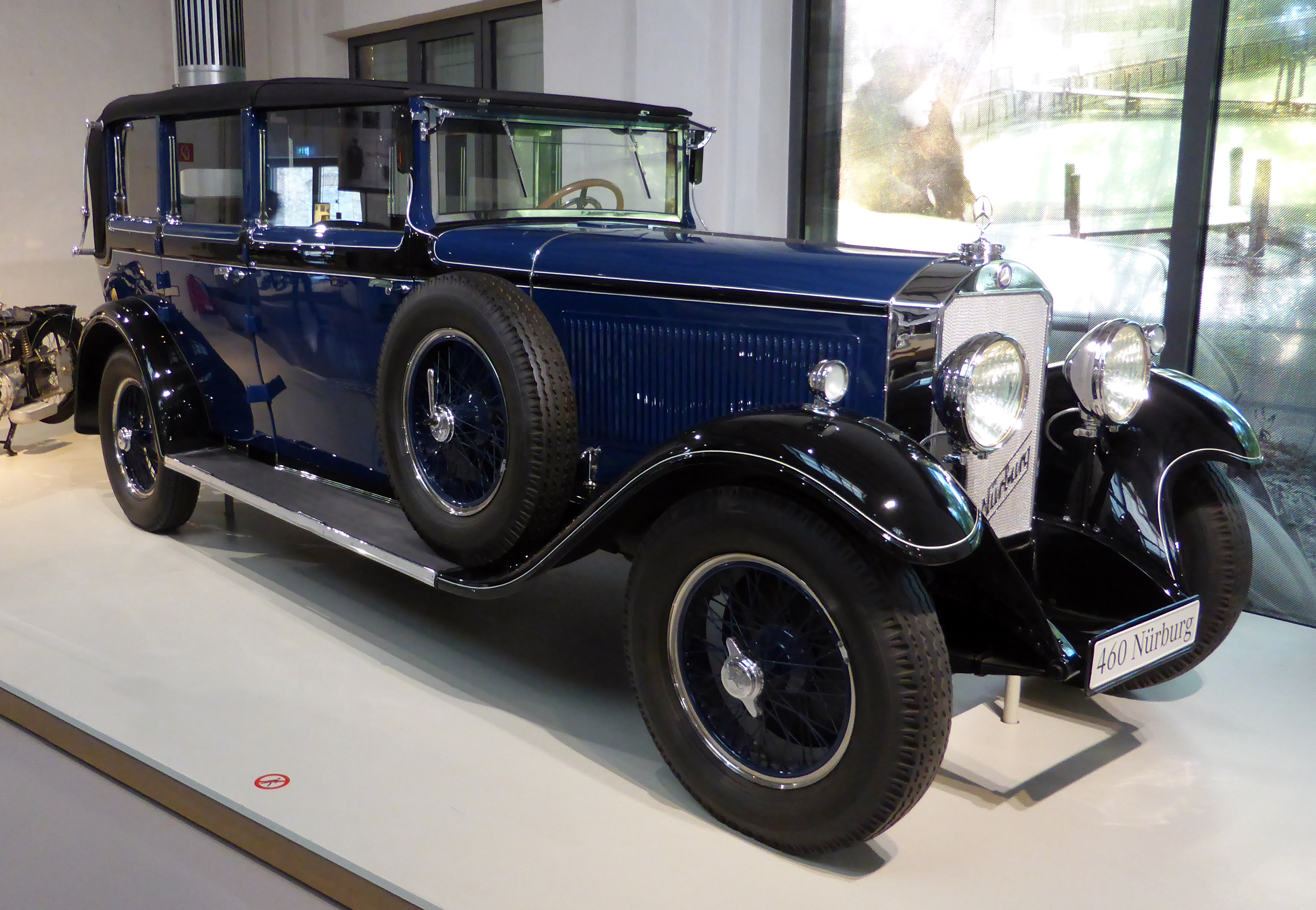 Mercedes-Benz Typ Nürburg 460, Baujahr 1929. Entwurf: Ferdinand Porsche. Karosserie: Pullmann-Transformations-Kabriolett von Erdmann & Rossi. Ausgestellt im Deutschen Technikmuseum in Berlin. Wikipedianische KulTour am 10. Oktober 2015 in der Ausstellung des Museums.